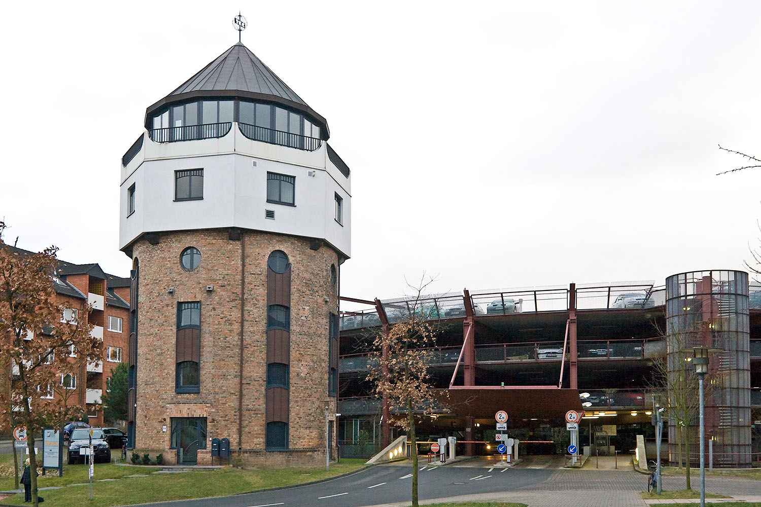 Vom 1960 aufgelösten Bahnbetriebswerk Lüneburg ist der Wasserturm erhalten geblieben, der in ein Bürogebäude umgebaut wurde. An der Stelle, wo sich der Ringlokschuppen und die Drehscheibe befanden, steht jetzt ein Parkhaus.